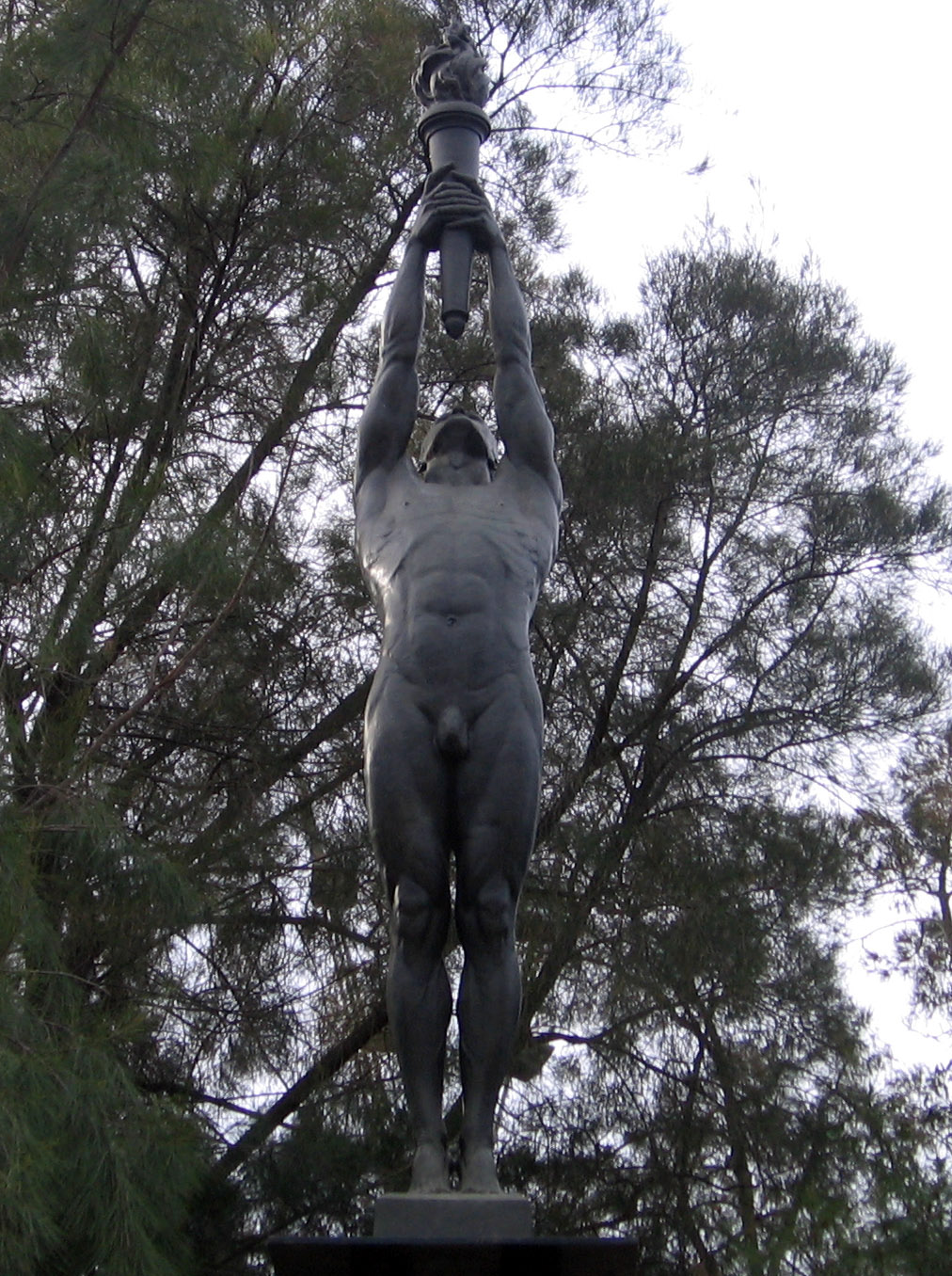 A Ferrer i Guàrdia, Auguste Puttemans, Montjuïc, Barcelona.